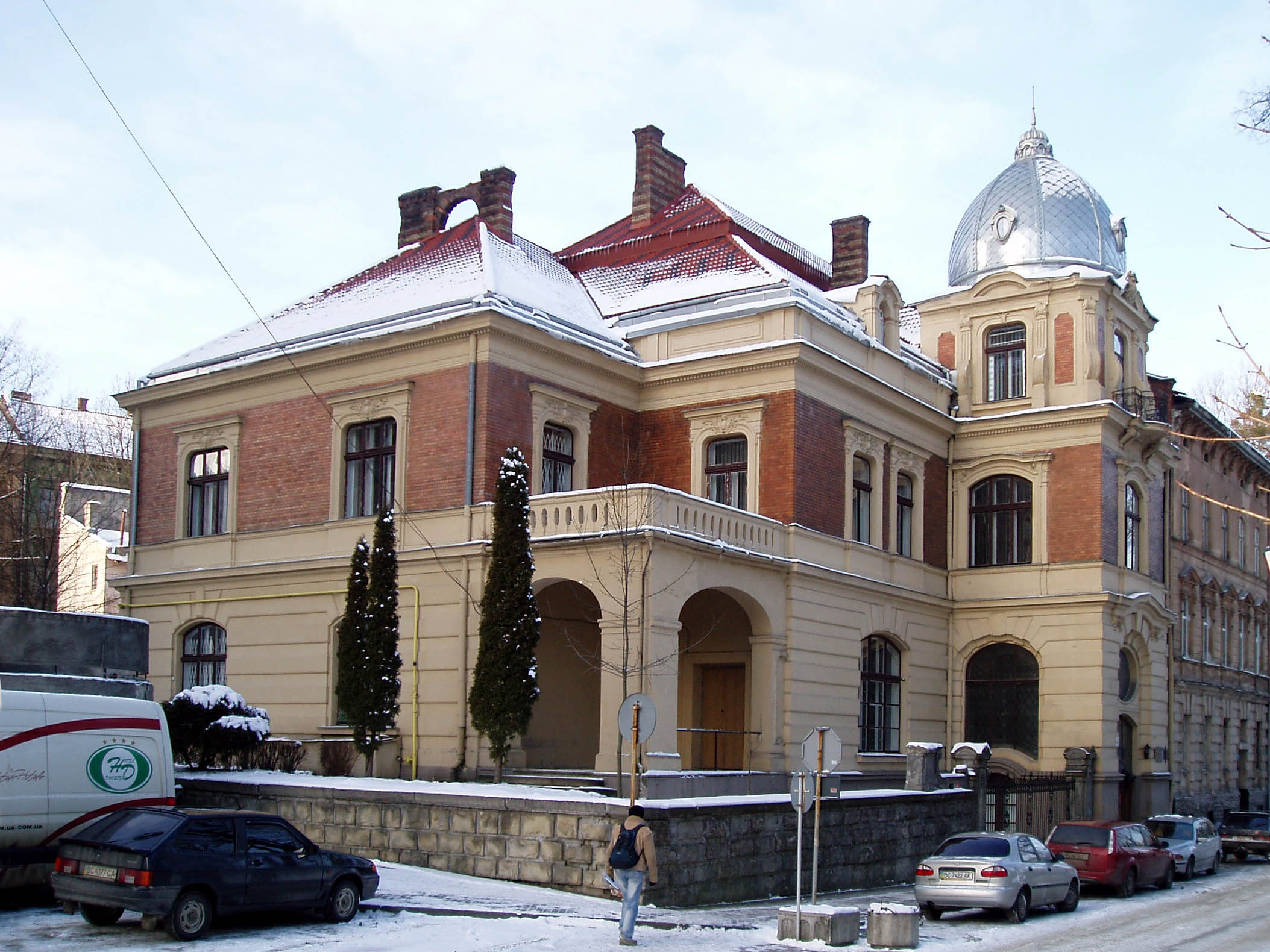 Будинок № 4 на вулиці Матейка у Львові. Початково збудований у 1892 році як Вілла Леона Пінінського за проектом Яна Томаша Кудельського